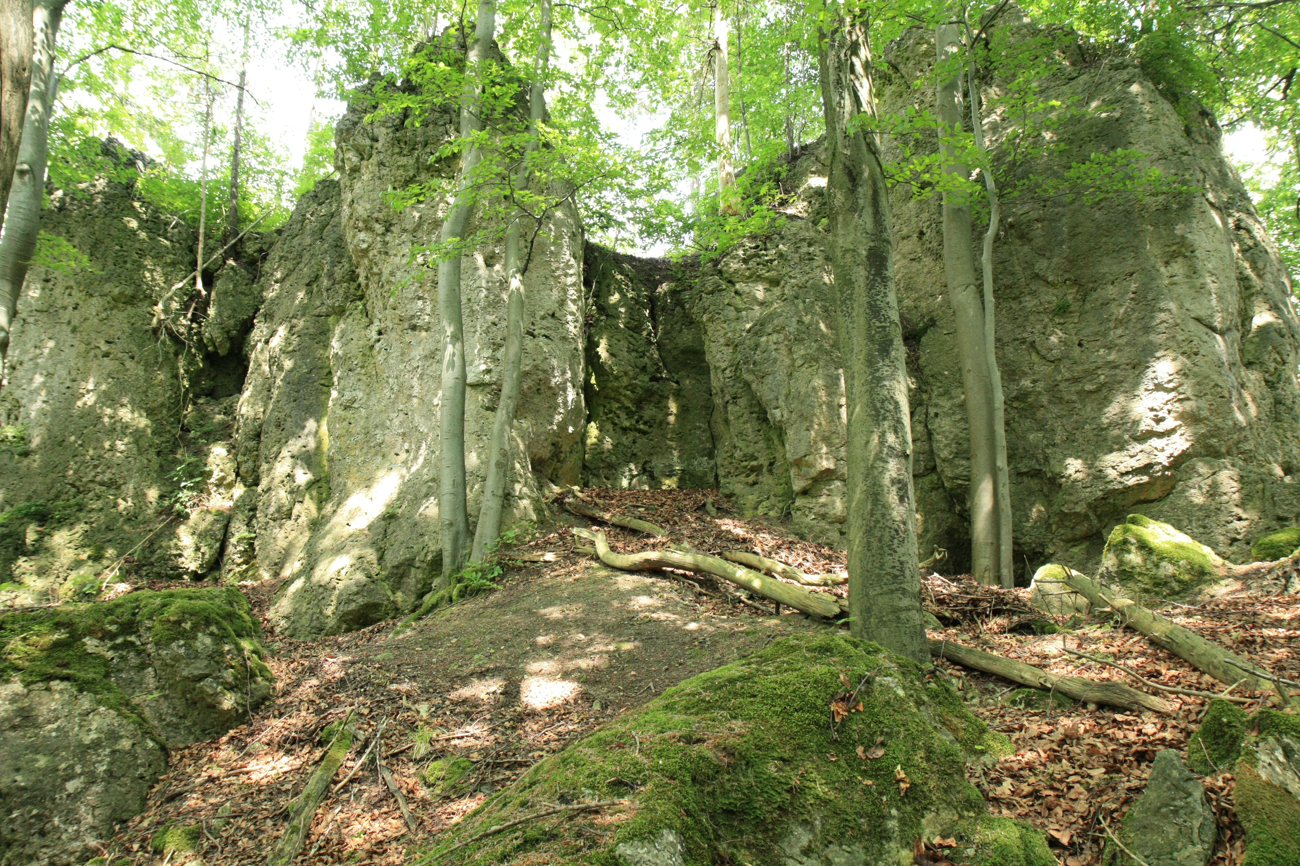 Der vermutliche Aufgang zur Oberburg der Burgruine Riegelstein